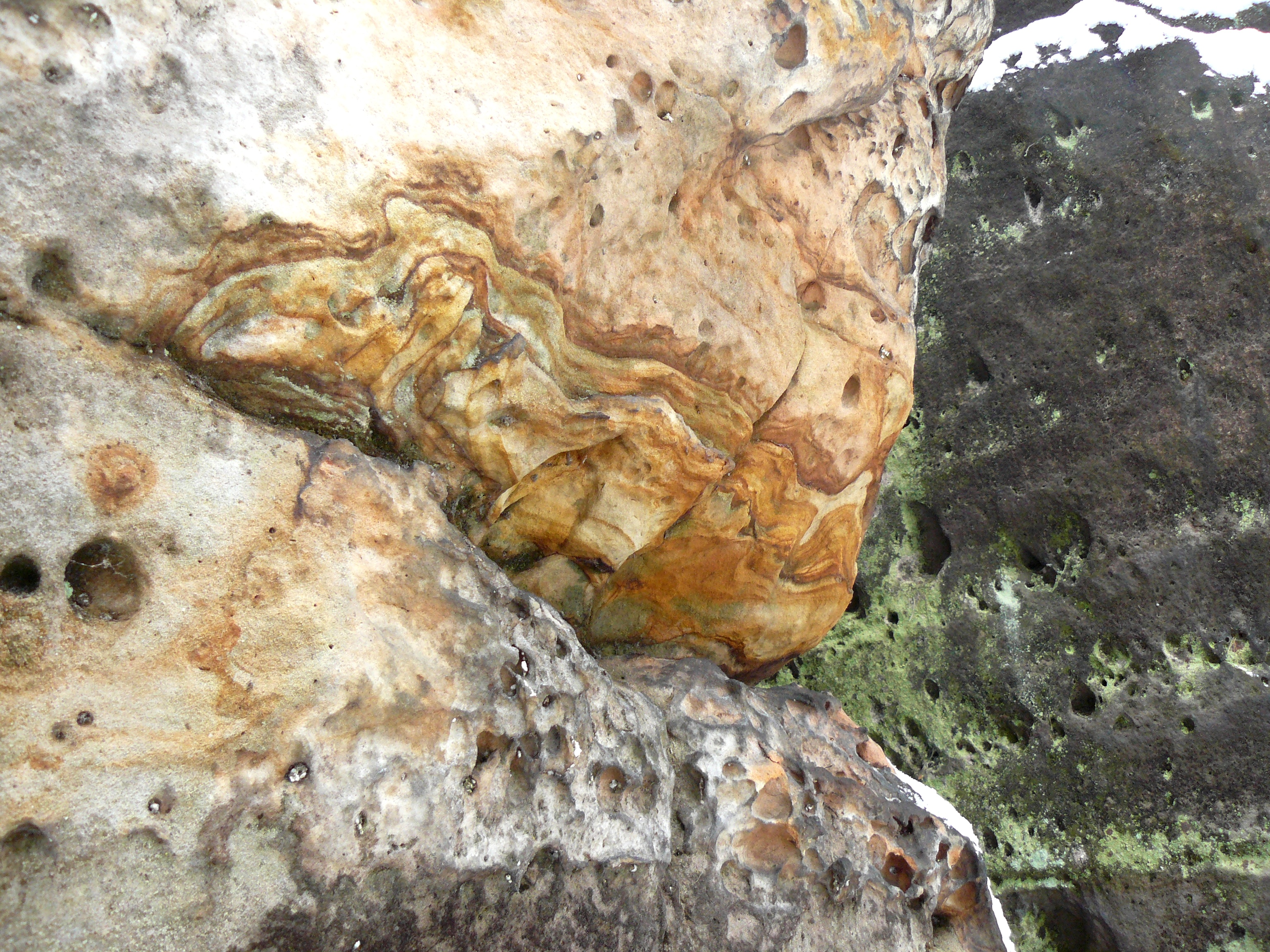 konkrece tvořené laminami železivce_Kalich (Český ráj)